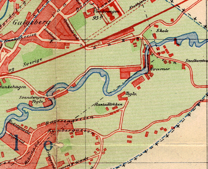 Kværner, Oslo.